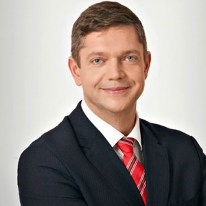 Tóth Bertalan (Pécs, 1975. november 10. –) jogász, szocialista politikus, az MSZP parlamenti frakcióvezetője. 2018-tól az MSZP elnöke.